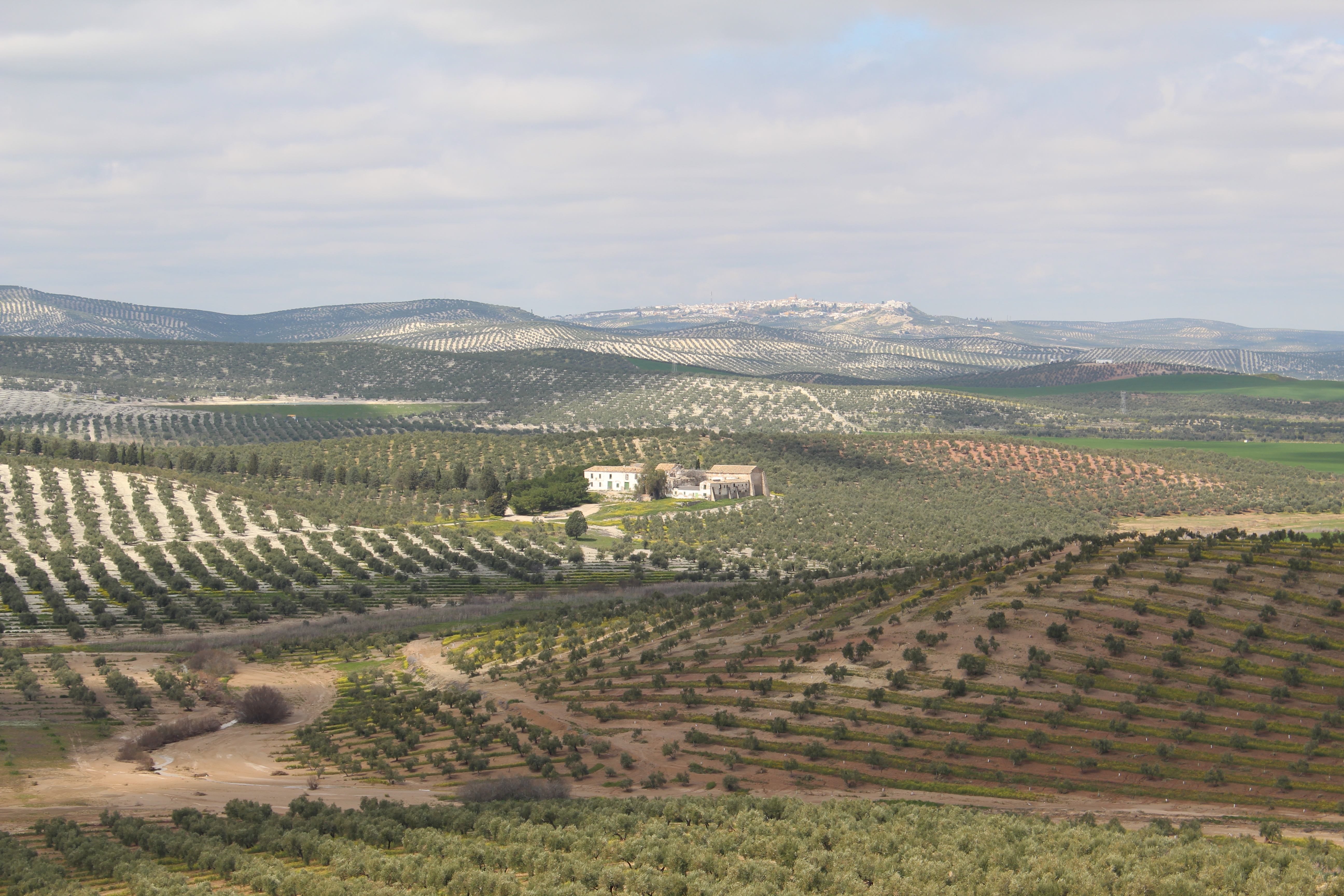 Vista lejana del cortijo de Mingo López, también conocido como cortijo de San Damián, y de la localidad de Arjona al fondo.